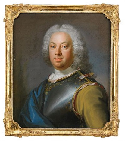 Porträtt av amiralen greve Carl Hans Sparre af Söfdeborg (1704-1770) iförd harnesk samt blå mantel. Målning av Gustaf Lundberg från ca 1750.